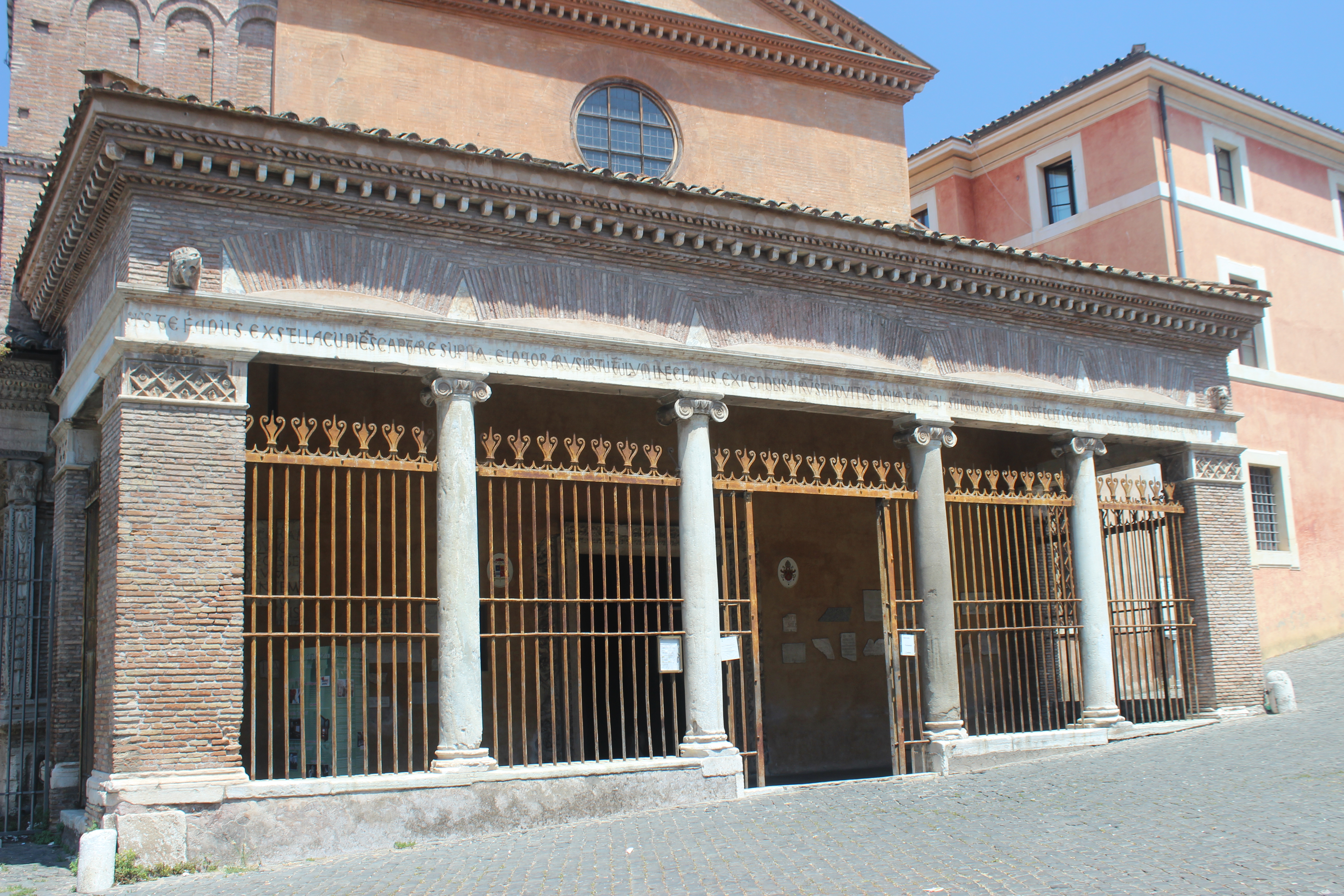 Roma. San Giorgio in Velabro. Exterior.